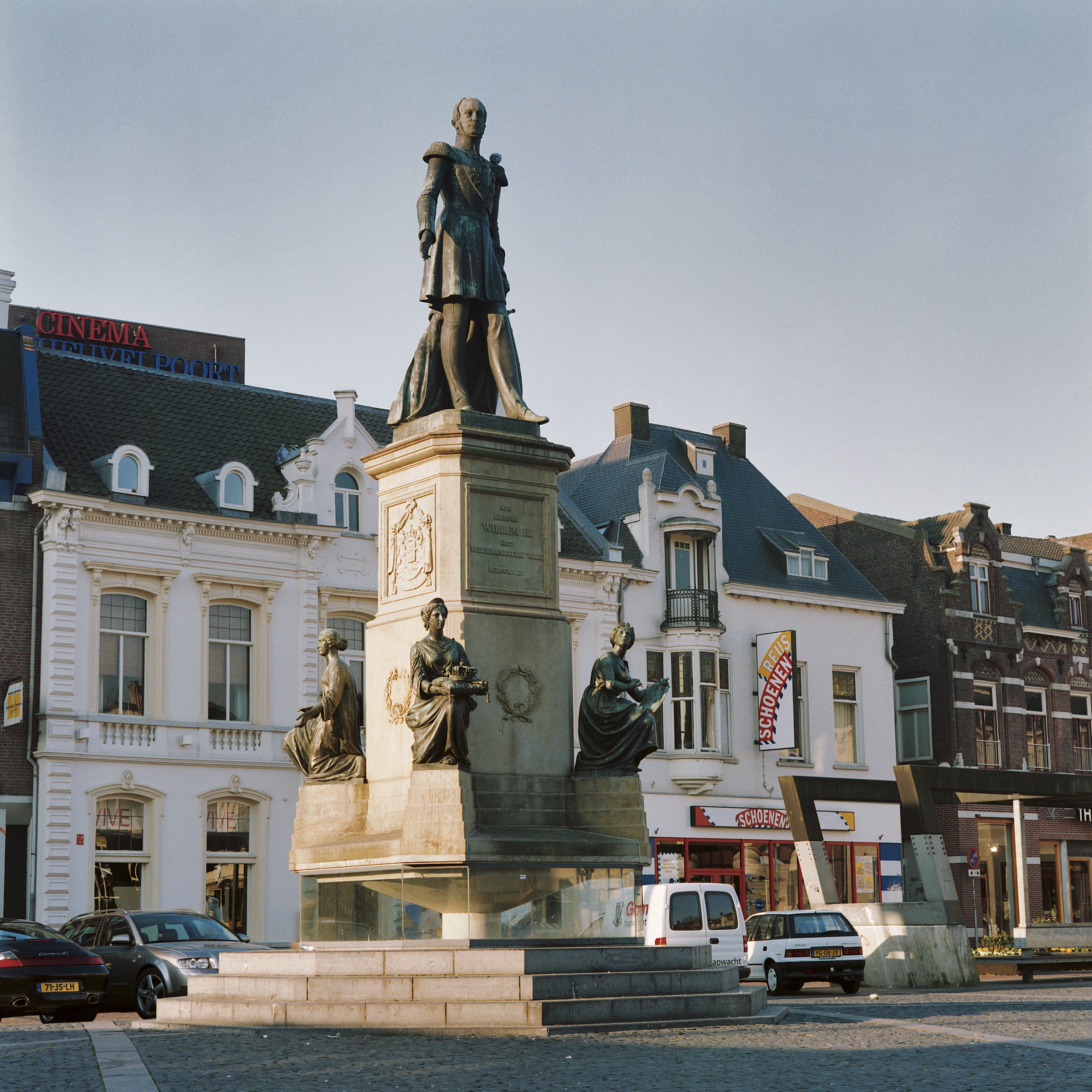 Standbeeld Koning Willem Ii: Overzicht voorzijde standbeeld met plaatsing in straatbeeld (opmerking: Gebruikt voor boek Monumenten voor Oranje en Nassau, pag. 133)